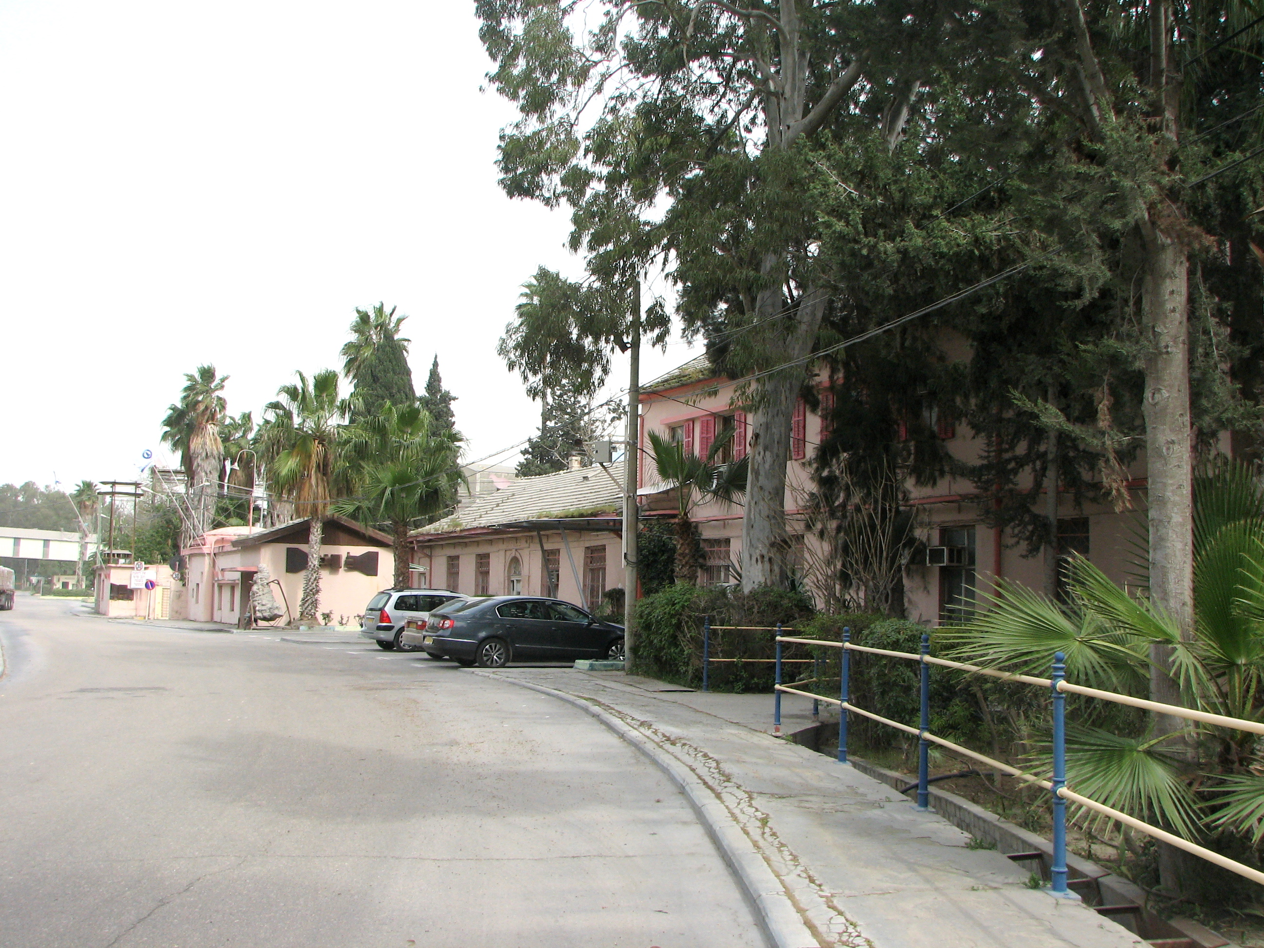 Nesher Israel Cement Enterprises in the city Nesher Israel. The factory was astablished in 1925 בית החרושת למלט בנשר- היום שמו נשר מפעלי מלט ישראליים נרשם ב- 1922 . בשנים לאחר מיכן הוקם באזור נשר . הכבשן הראשון הופעל באוקטובר 1925 מבנה ההנהלה. קומת הקרקע הוקמה בשנות ה-30 של המאה ה-20